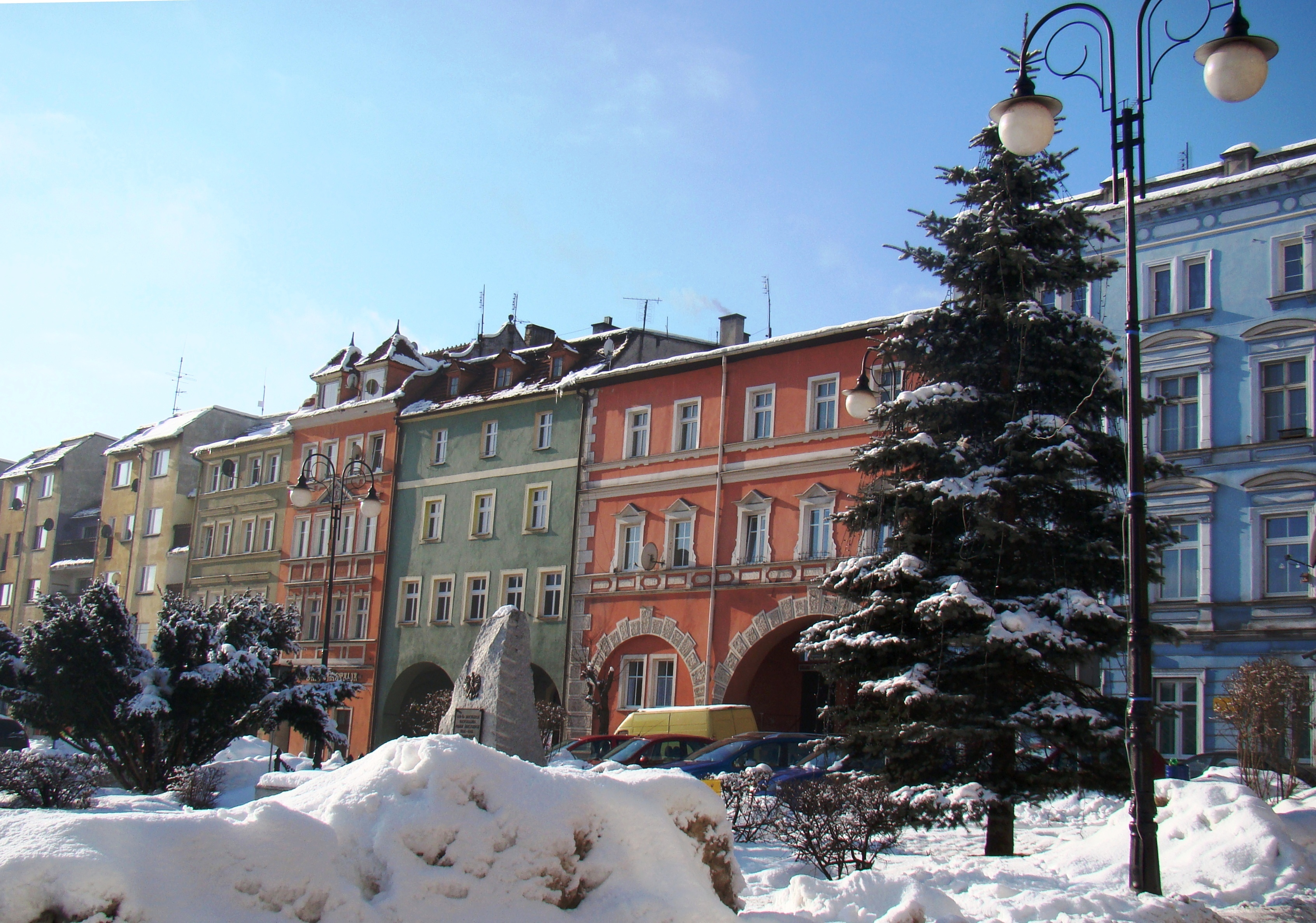 Mieroszów - Plac Niepodległości / Rynek (zabytek nr 624 z 1.09.1959)